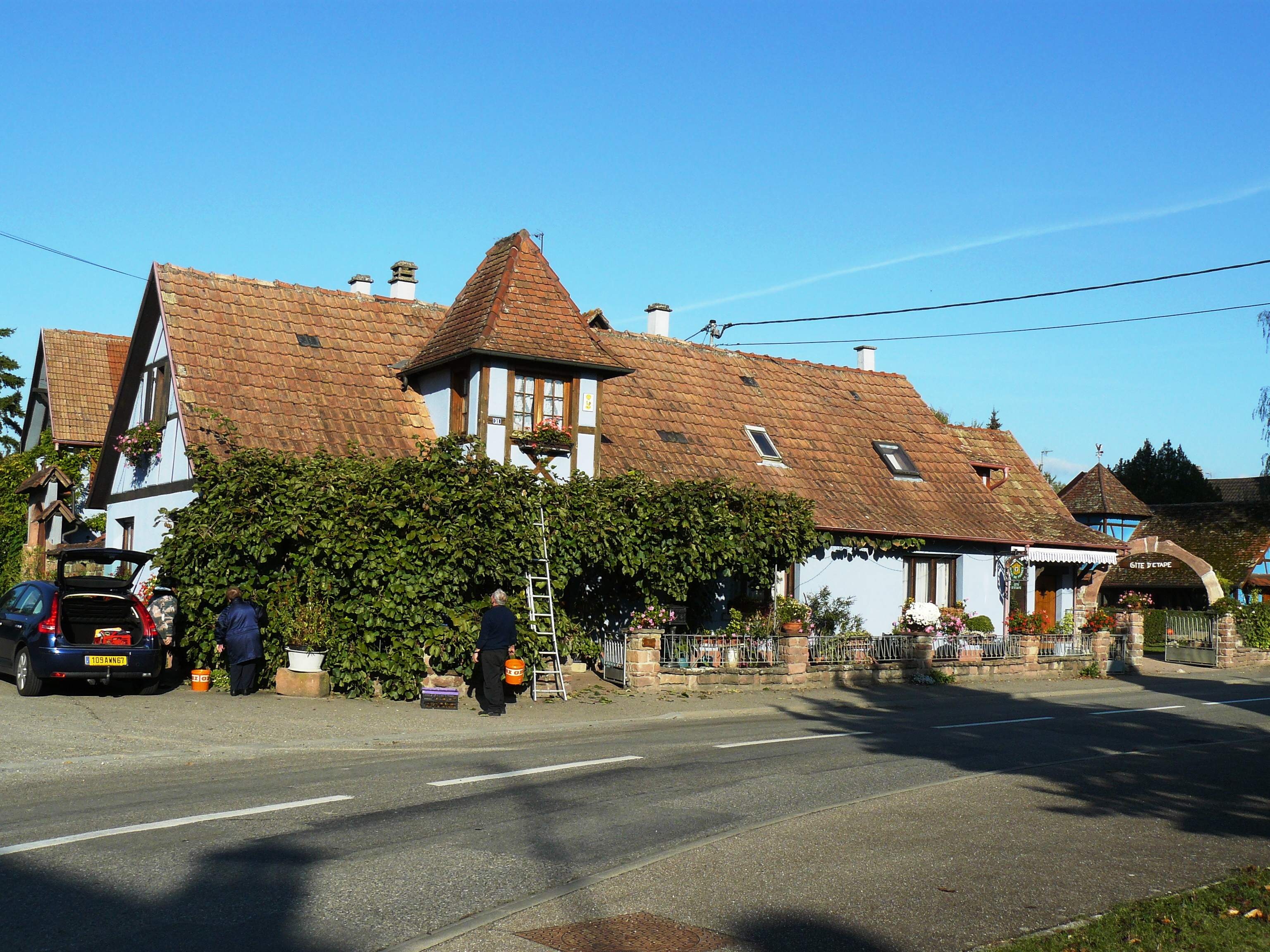 Maison du XVIIIe siècle